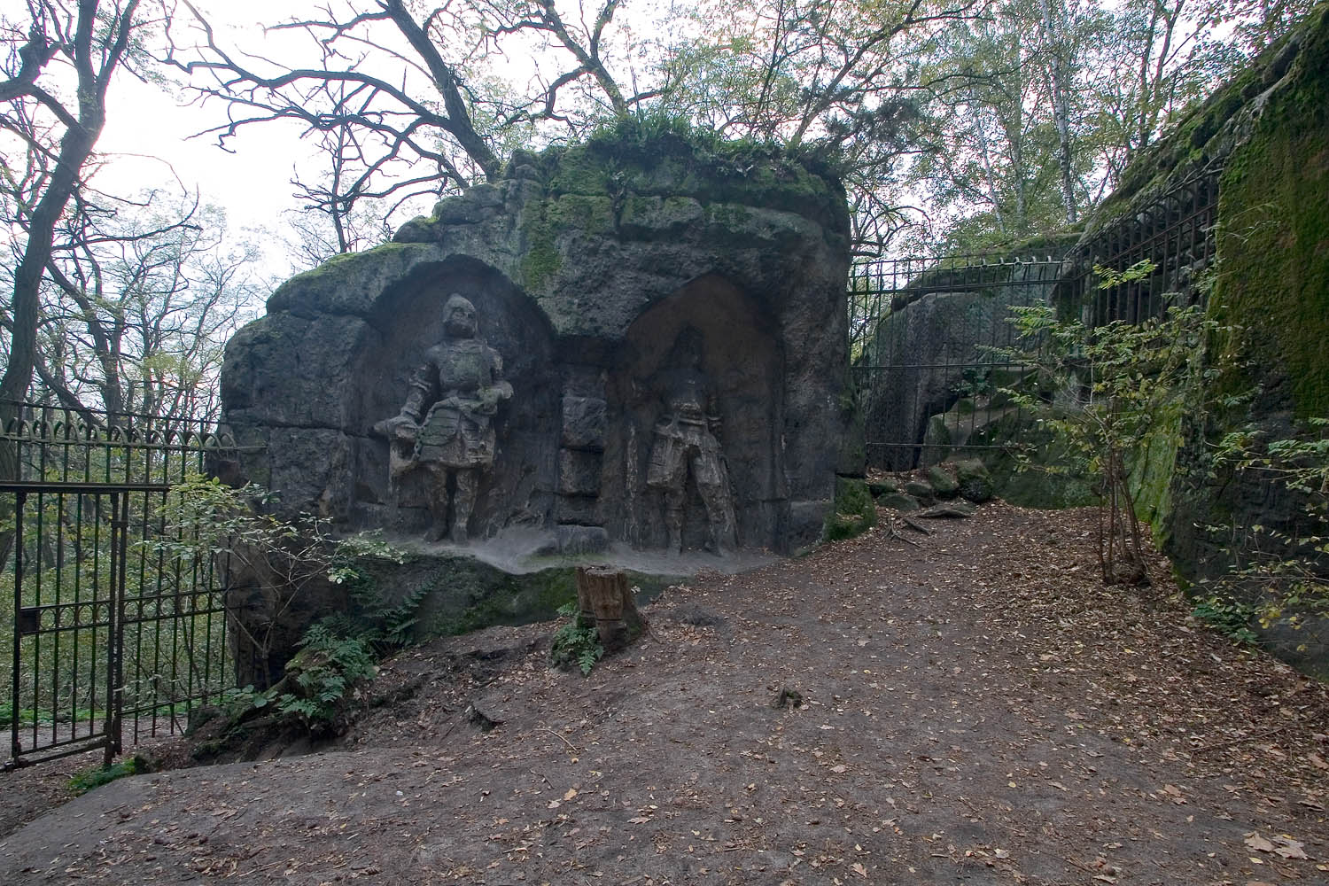 Pískovcové reliéfy před jeskyní Klácelka nad obcí Želízy